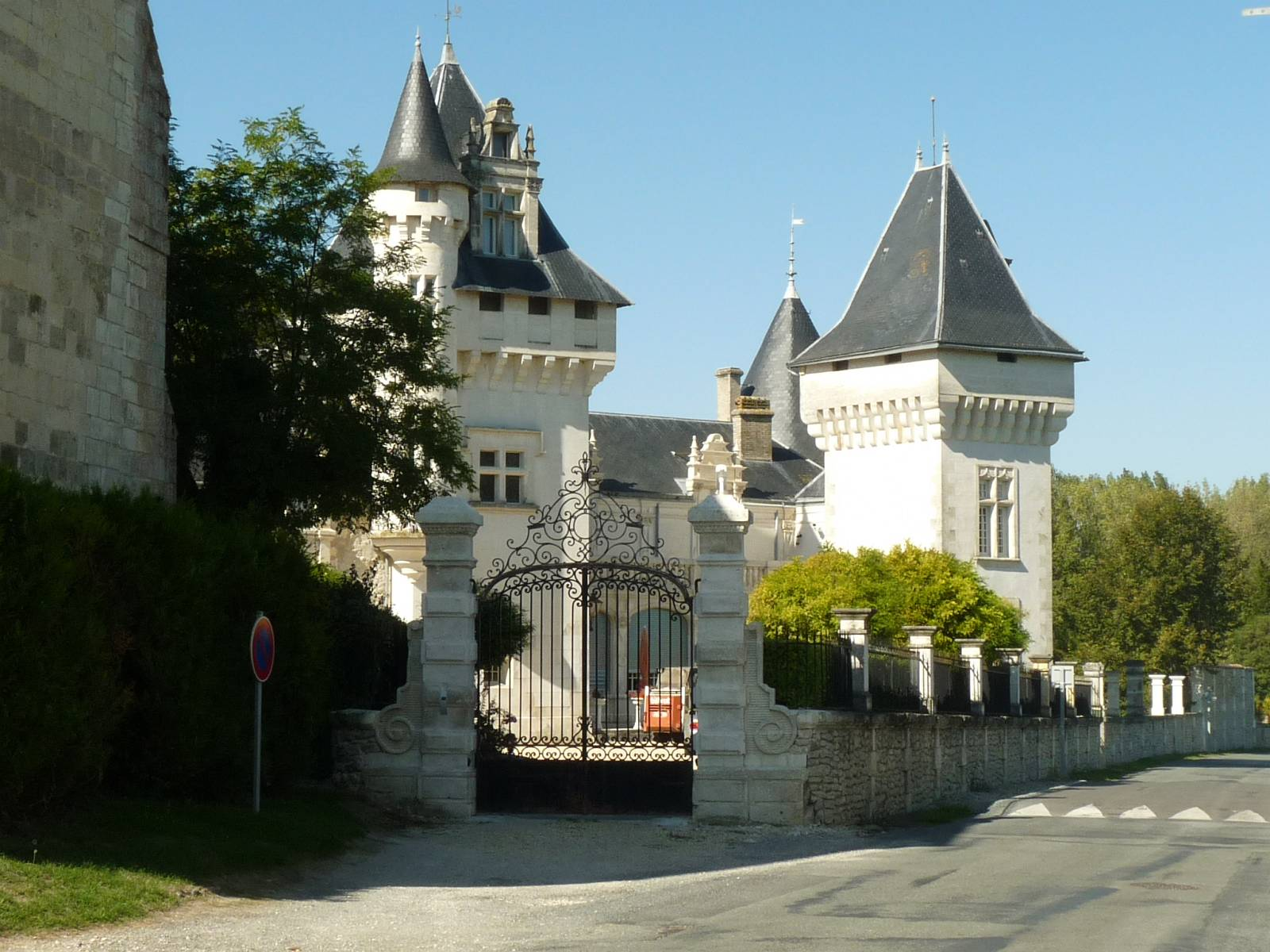 château de Champagne (24), France